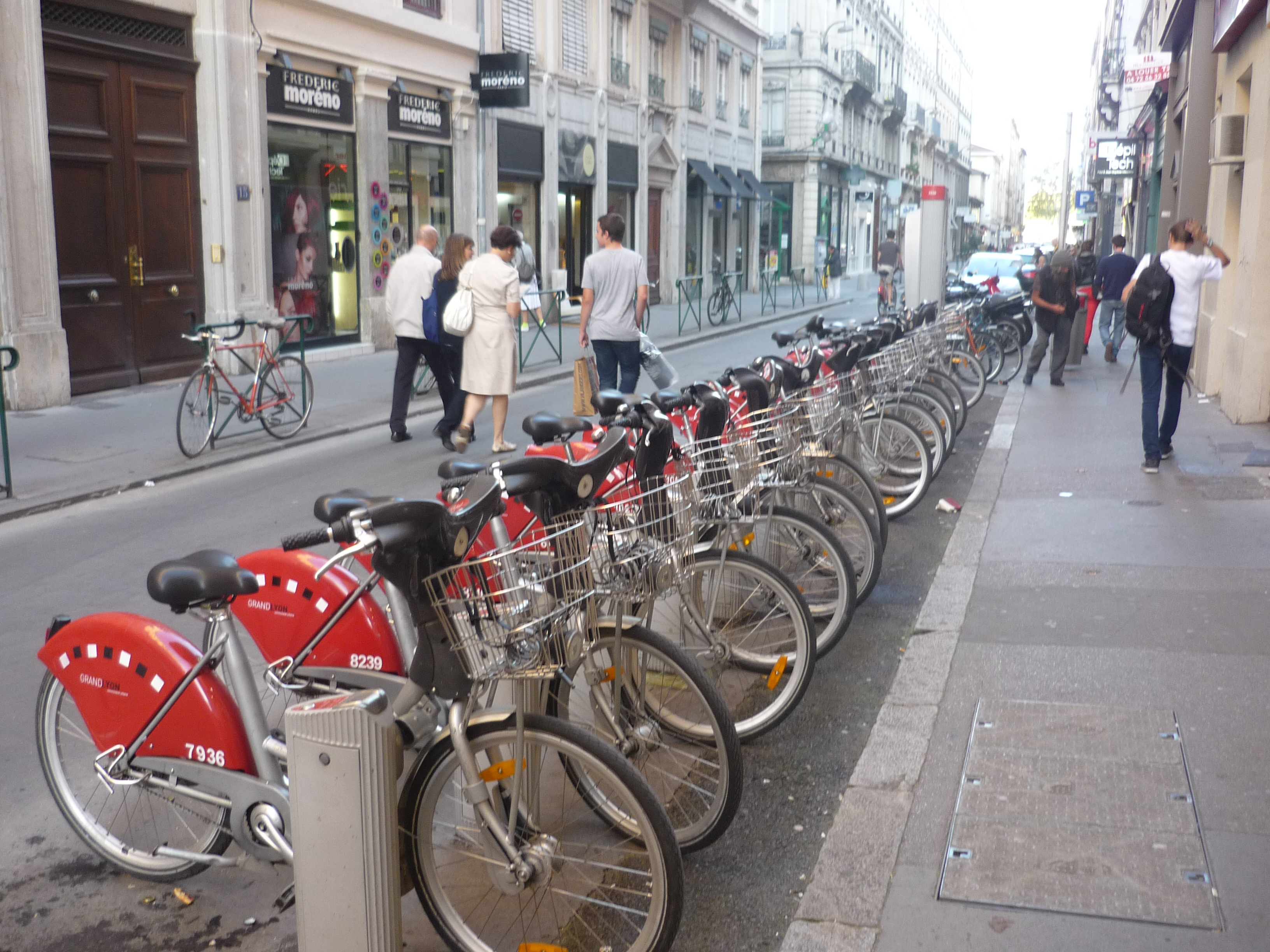 Vélos de la station 2038 du Vélo'v de Lyon, dans le 2e arrondissement